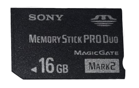 La carte mémoire Sony Memory Stick PRO Duo de type Mark2 avec une capacité de 16GB